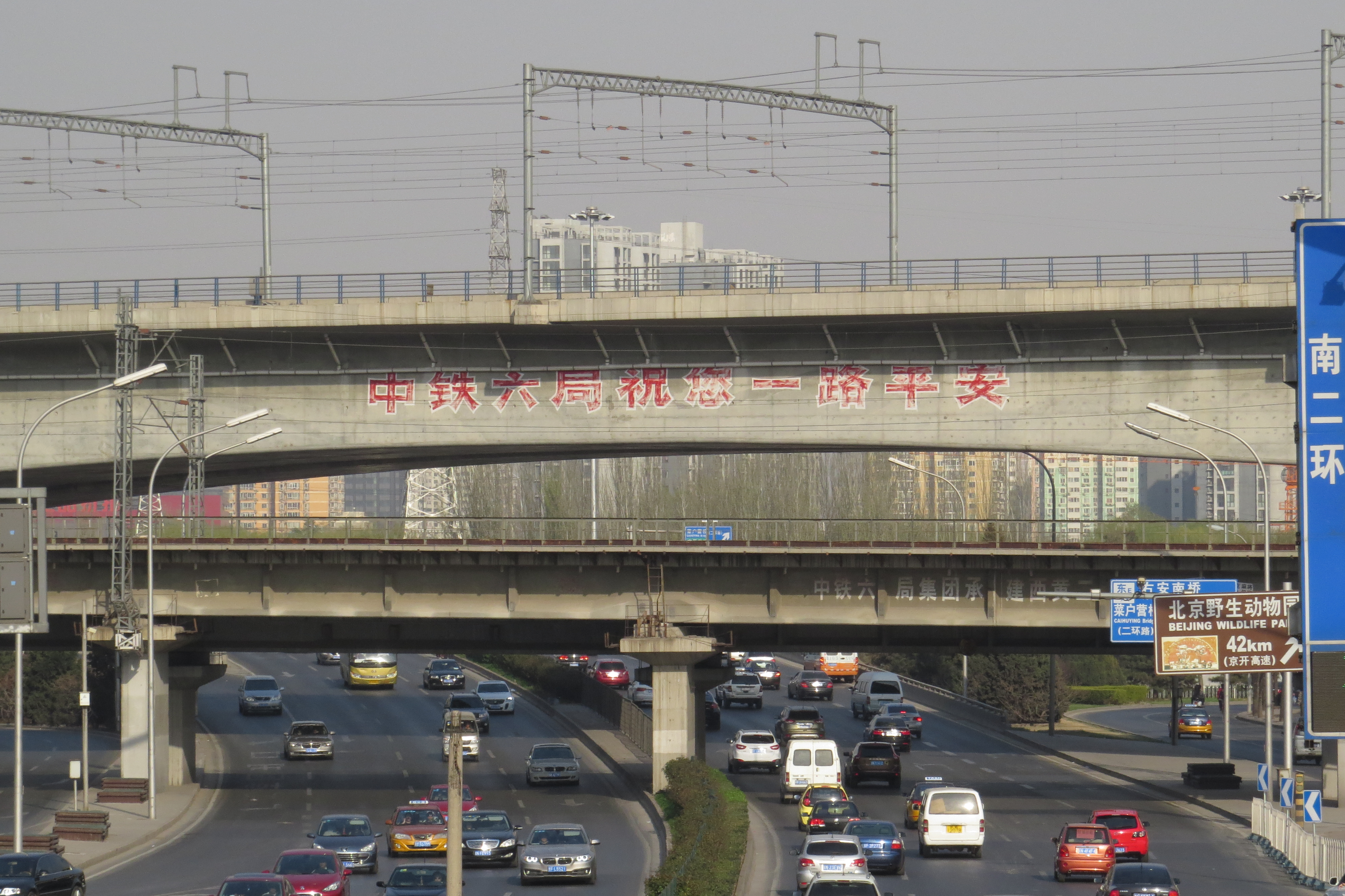 上跨南三环玉泉营段的京沪高速铁路、京九铁路桥